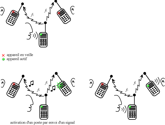 Principe de l'écoute sélective et de l'activation d'un poste par un signal. Auteur : Christophe Dang Ngoc Chan (Cdang), réalisé avec un programme de dessin vectoriel.